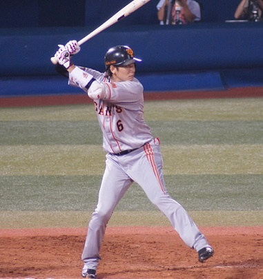 Giants_sakamoto6